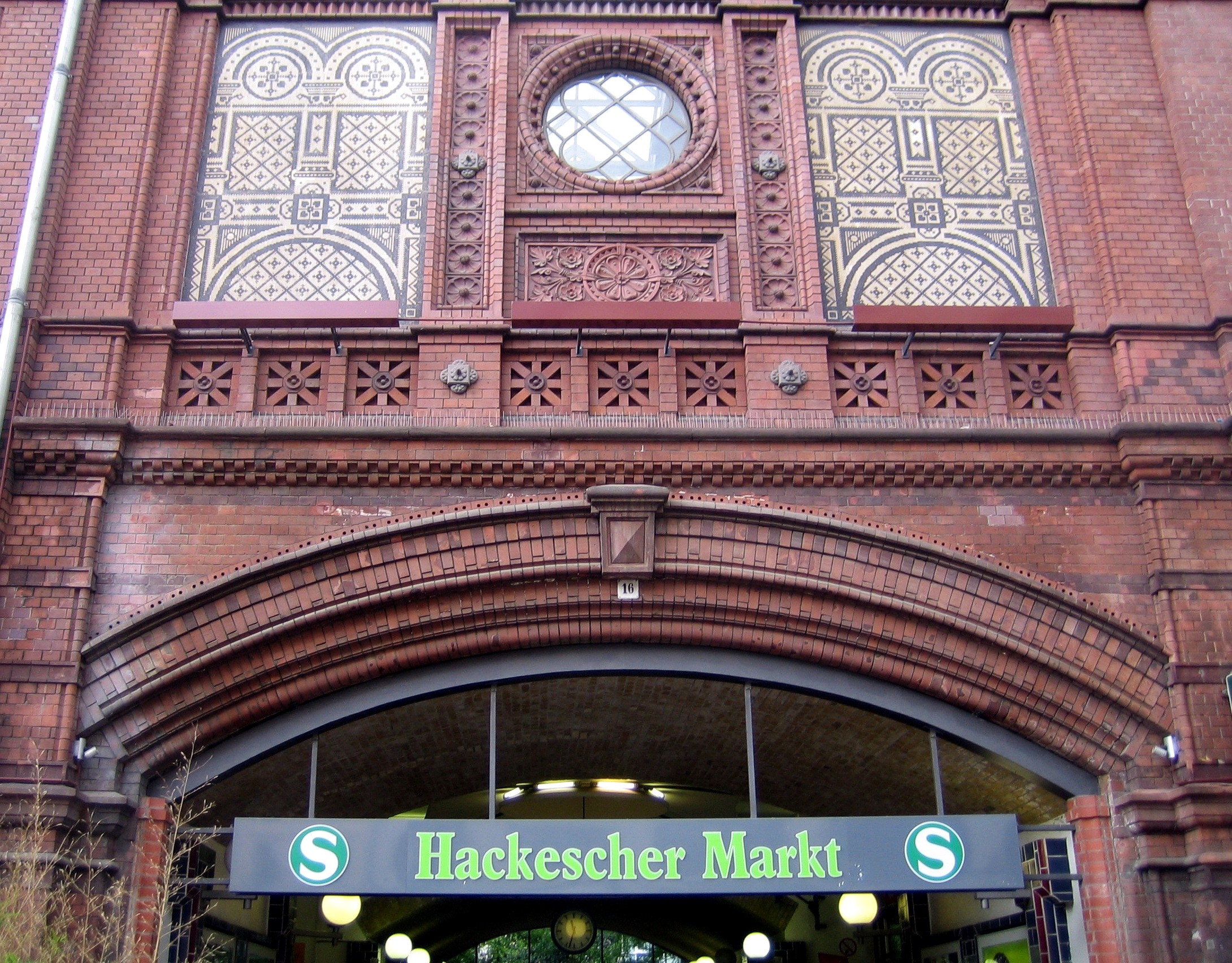 Backsteinornamentik am Eingang des S-Bahnhofs "Hackescher Markt" in Berlin, erbaut 1878-82.